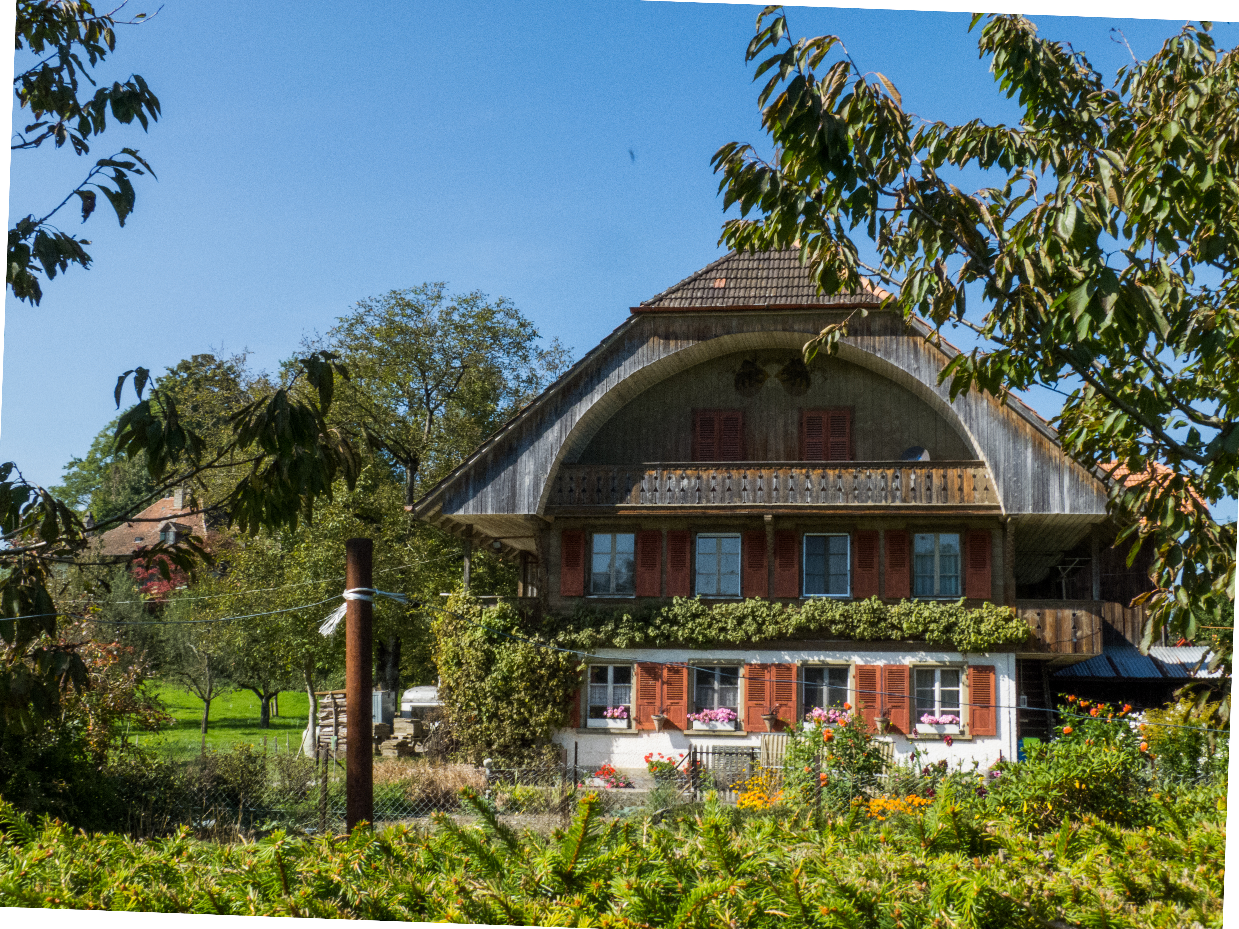 Bauernhaus Schlingmoos Gurzelen, um 1740